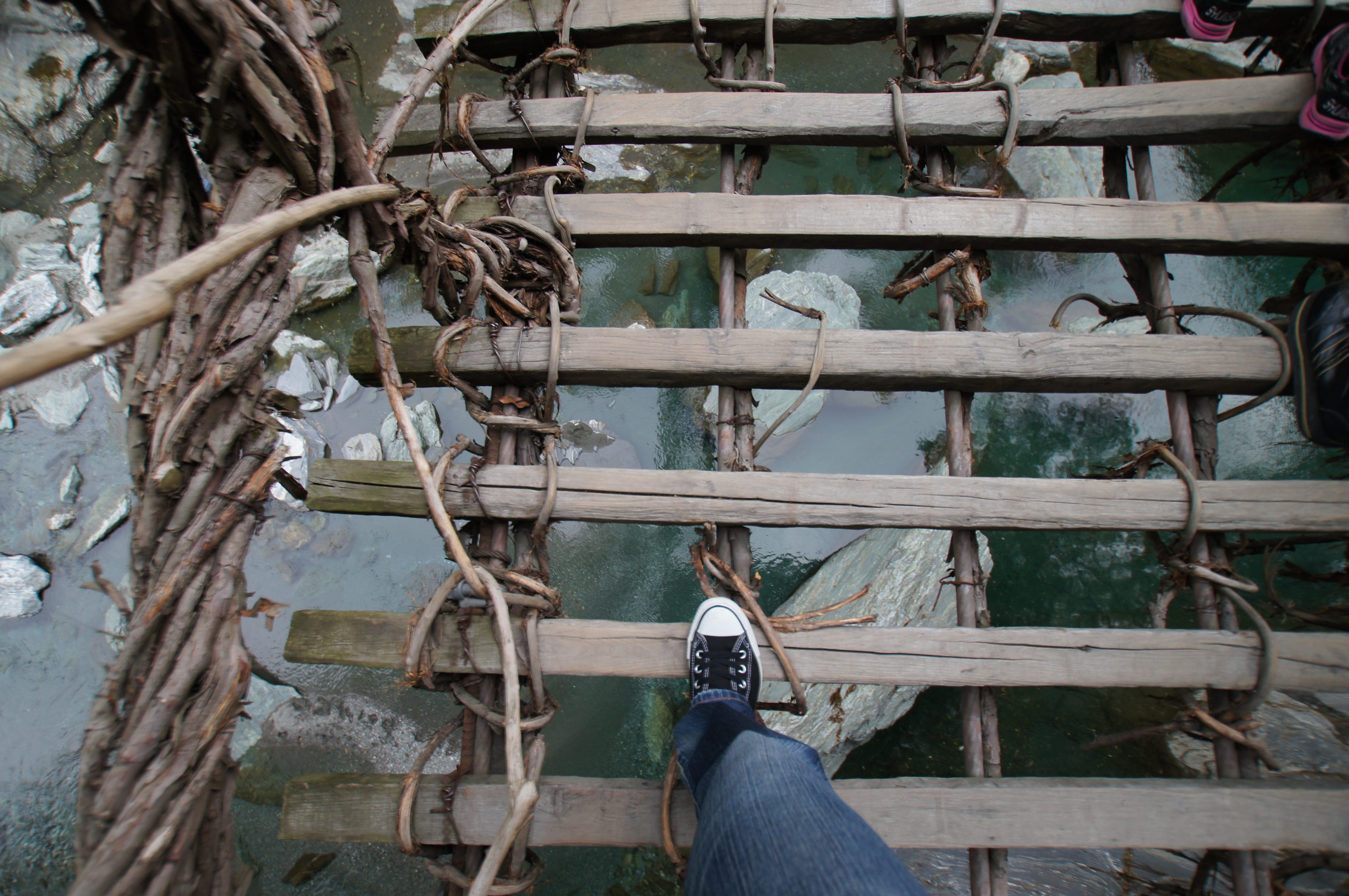 祖谷の蔓橋 Iya Kazurabashi